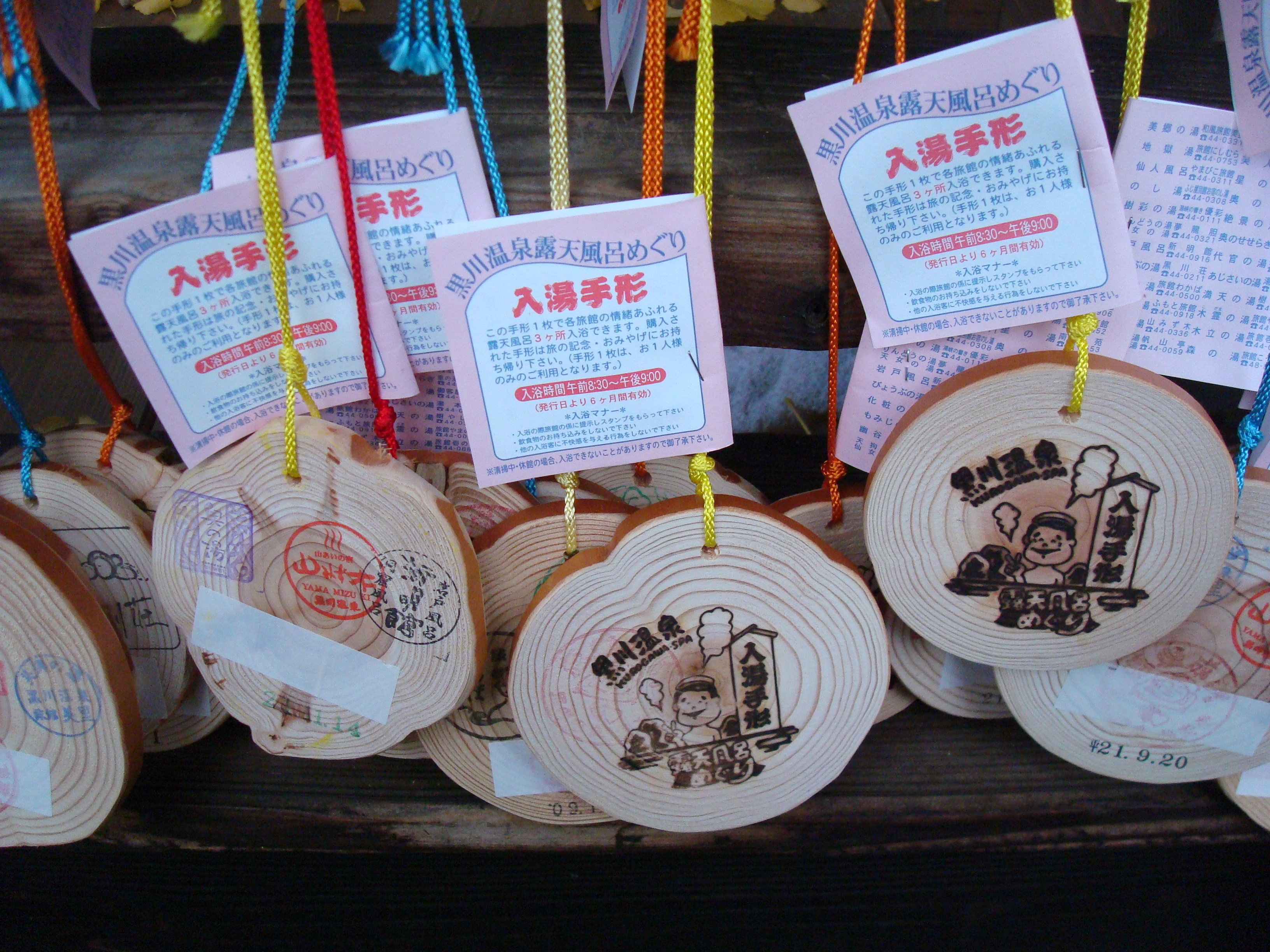 黒川温泉露天風呂めぐり 入湯手形